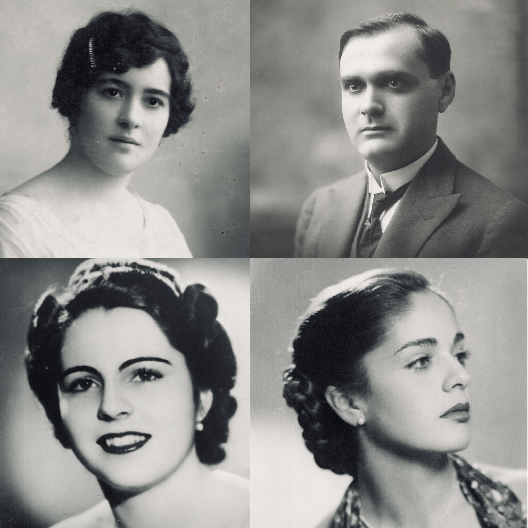 Collage con los padres y hermanas de Alicia Pietri.